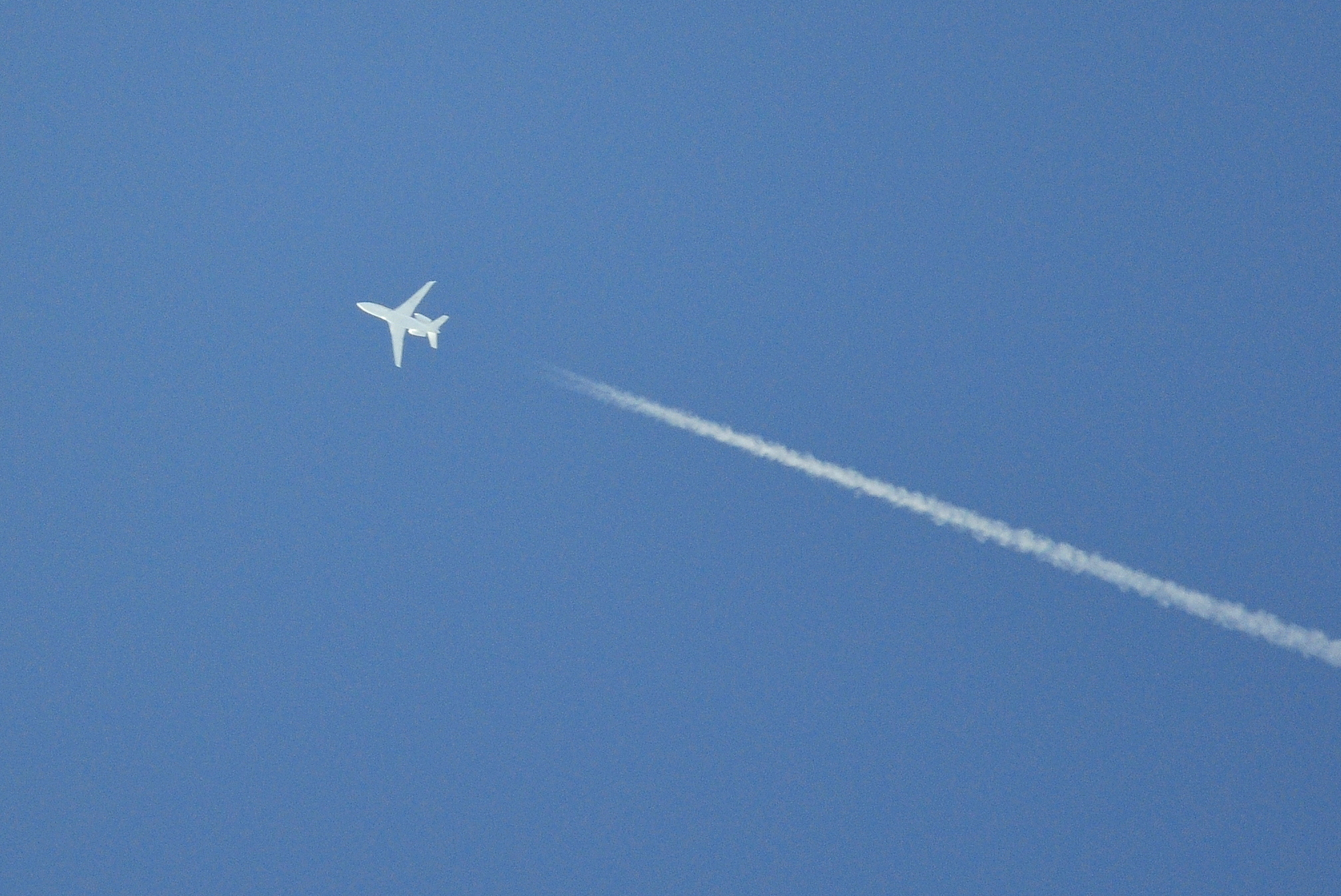 Dassault Falcon 2000 nad zachodnią Polską